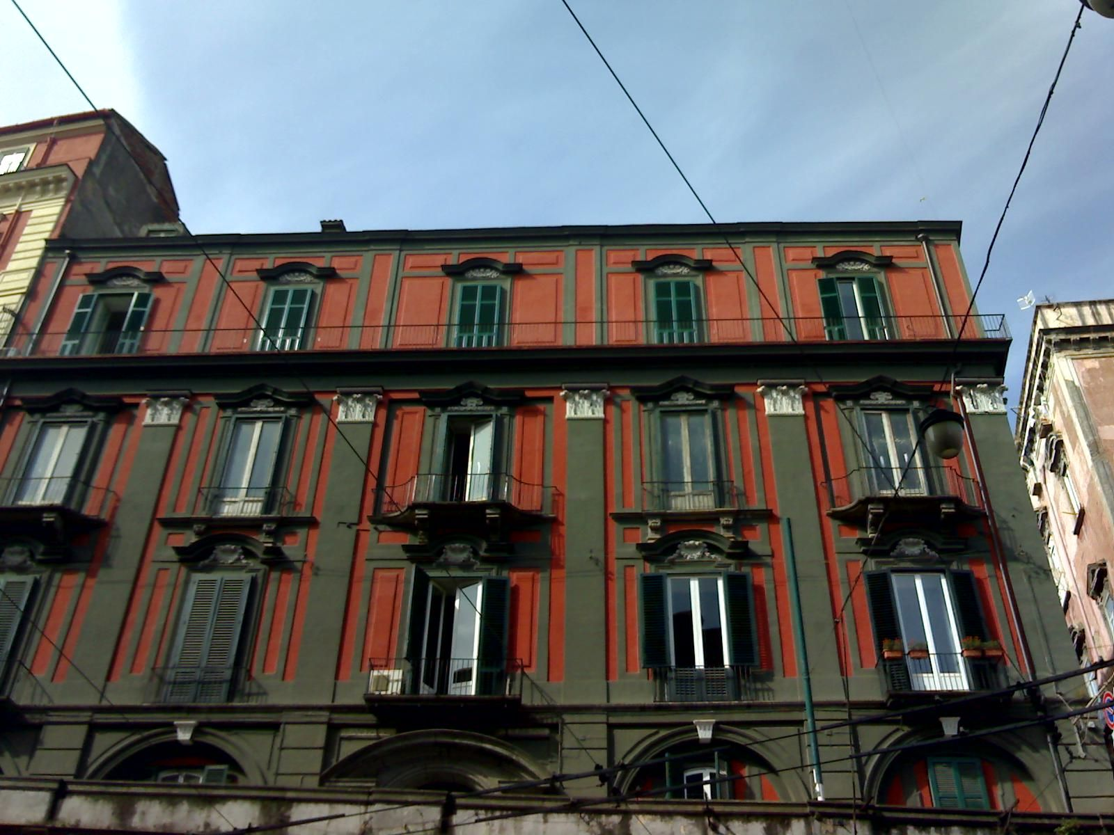 Palazzo Solimena (NapoIi)